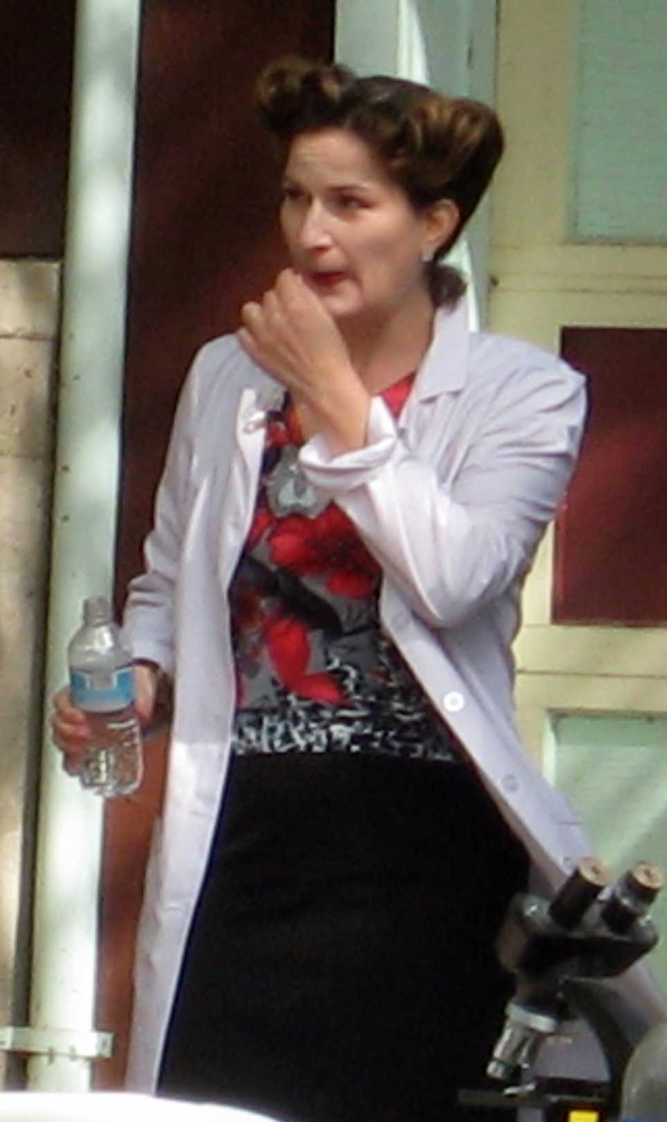 Ana Gasteyer